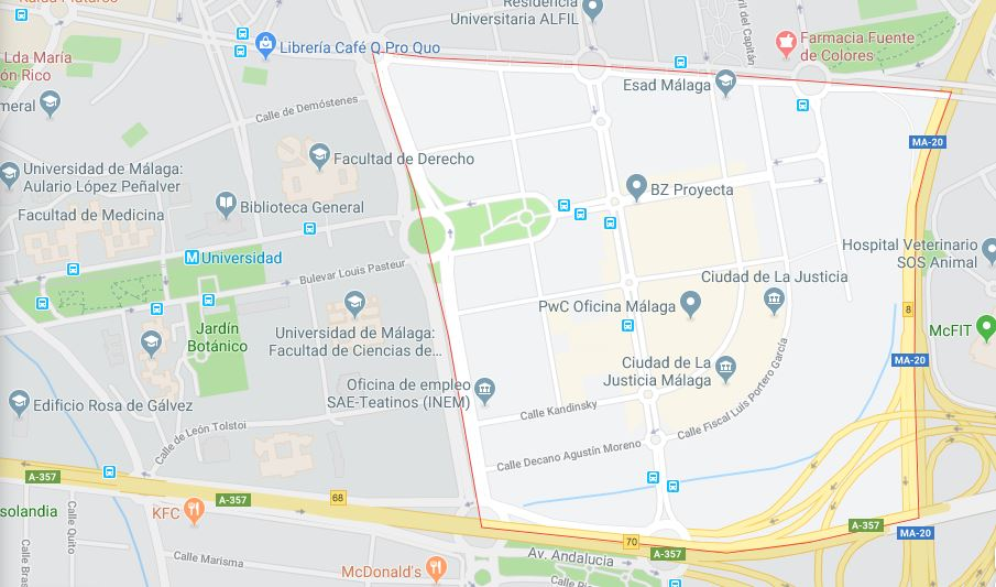 Mapa de Hacienda Bizcochero (2019)